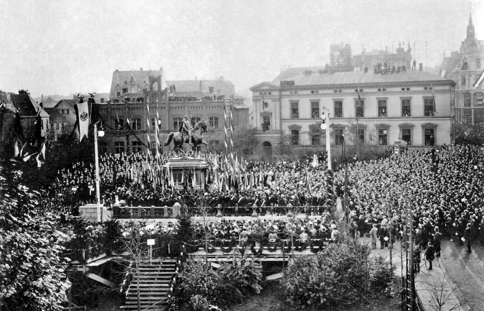 Einweihung des Kaiser-Wilhelm I.-Denkmals auf dem Burgplatz in Essen; hinten links: alte Jesuitenresidenz, hinten rechts: damaliges Hauptpostamt